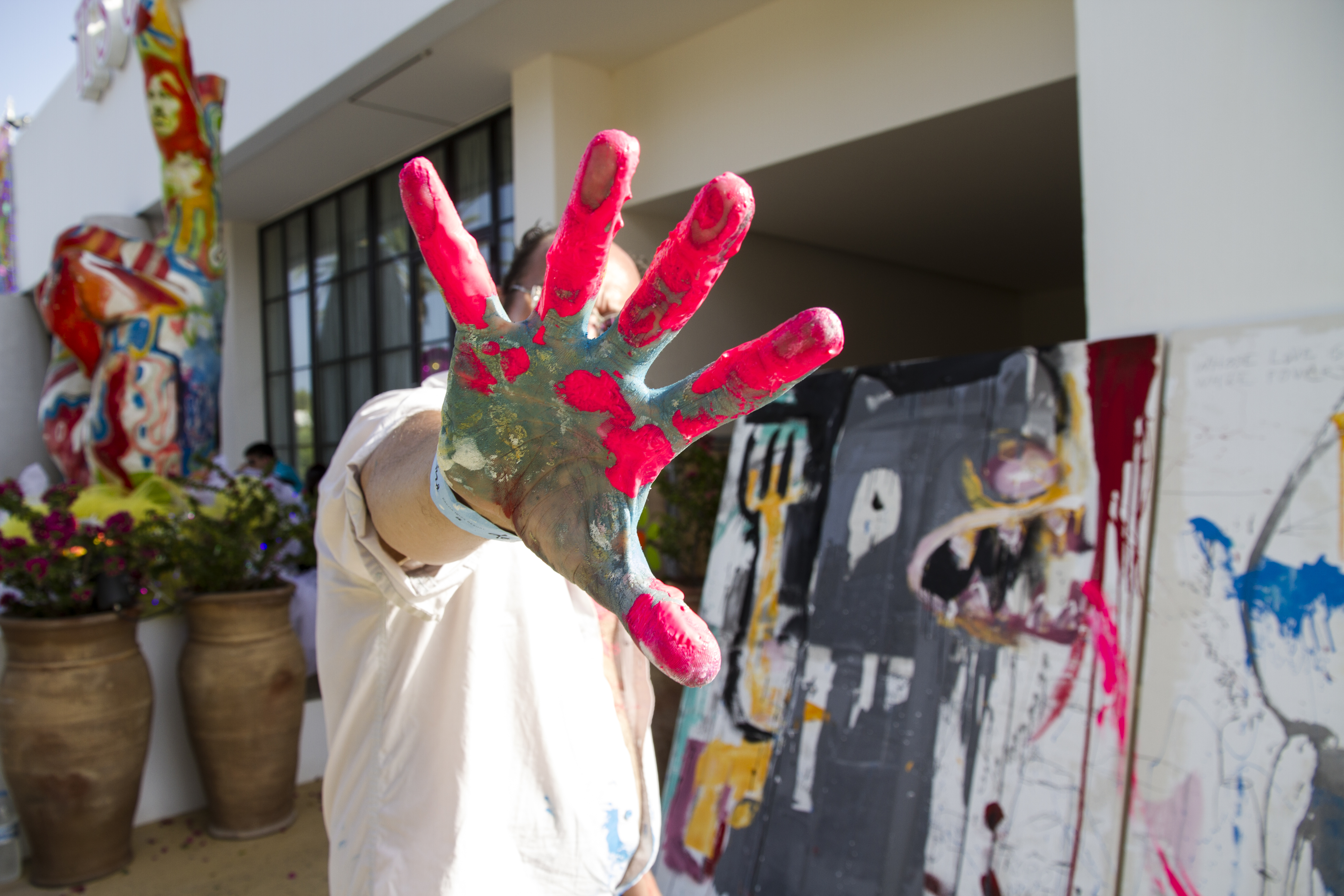 Jesús de Miguel en una performance de Arte en Vivo. Ibiza, julio de 2017